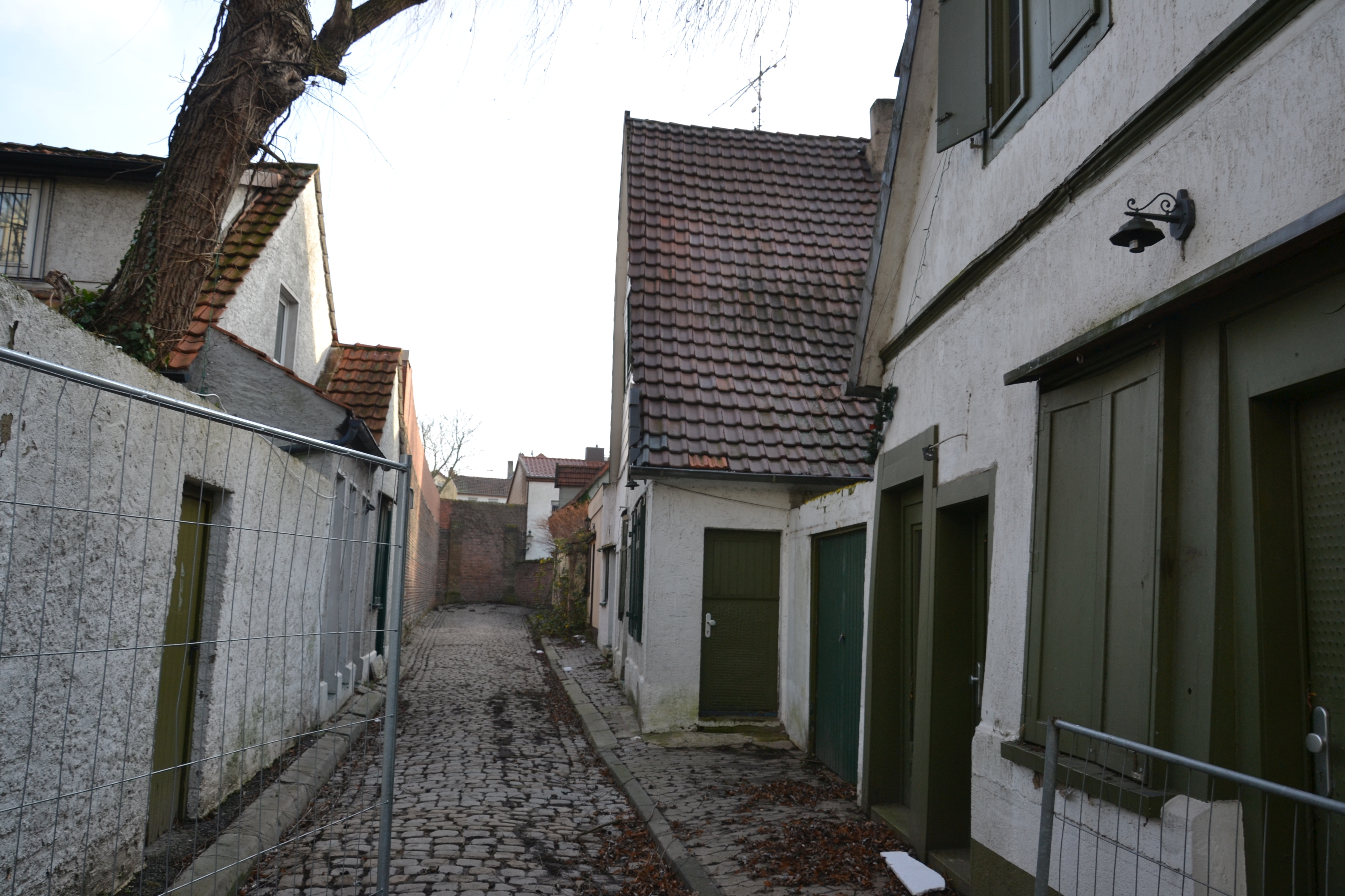 Blick in die Straße Rampenloch 2020